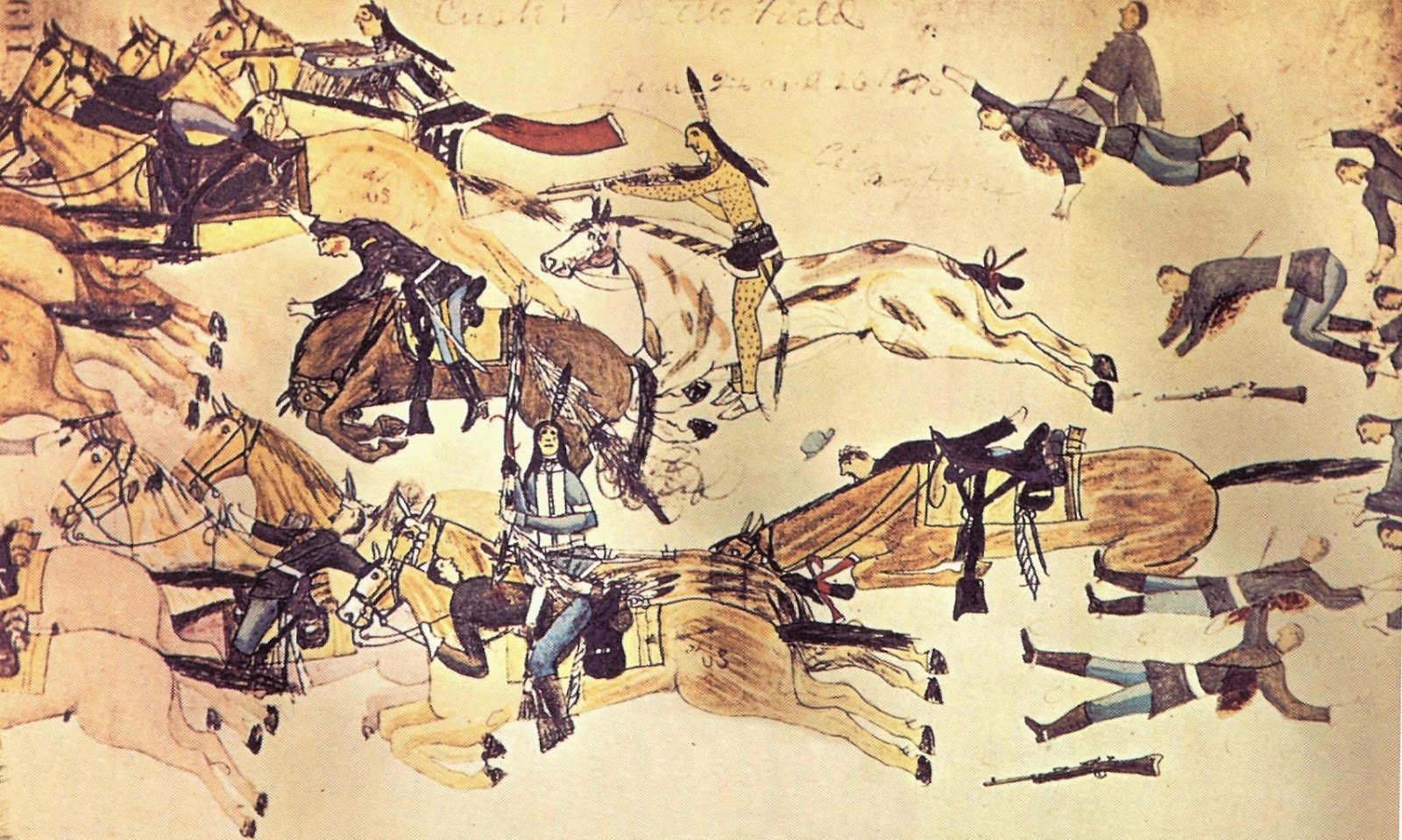 Darstellung einer Kampfszene mit Crazy Horse in der Schlacht am Little Bighorn, gezeichnet von dem Oglala-Lakota-Sioux Amos Bad Heart Bull (Tatanka Chante Shicha) nach 1890. (Von diesem Künstler sind 407 Bilder über die Geschichte seines Volkes bekannt, die er mit Tinte, Bleistift und Pastellfarben auf Papier geschaffen hat.)